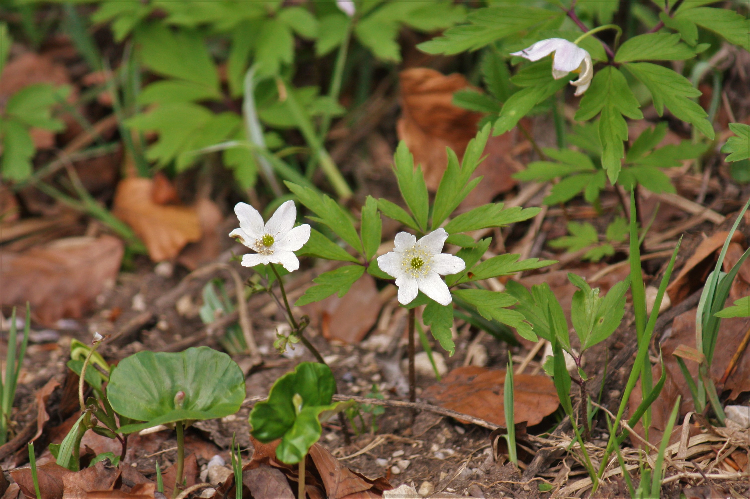 Blume in Wildbad Kreuth